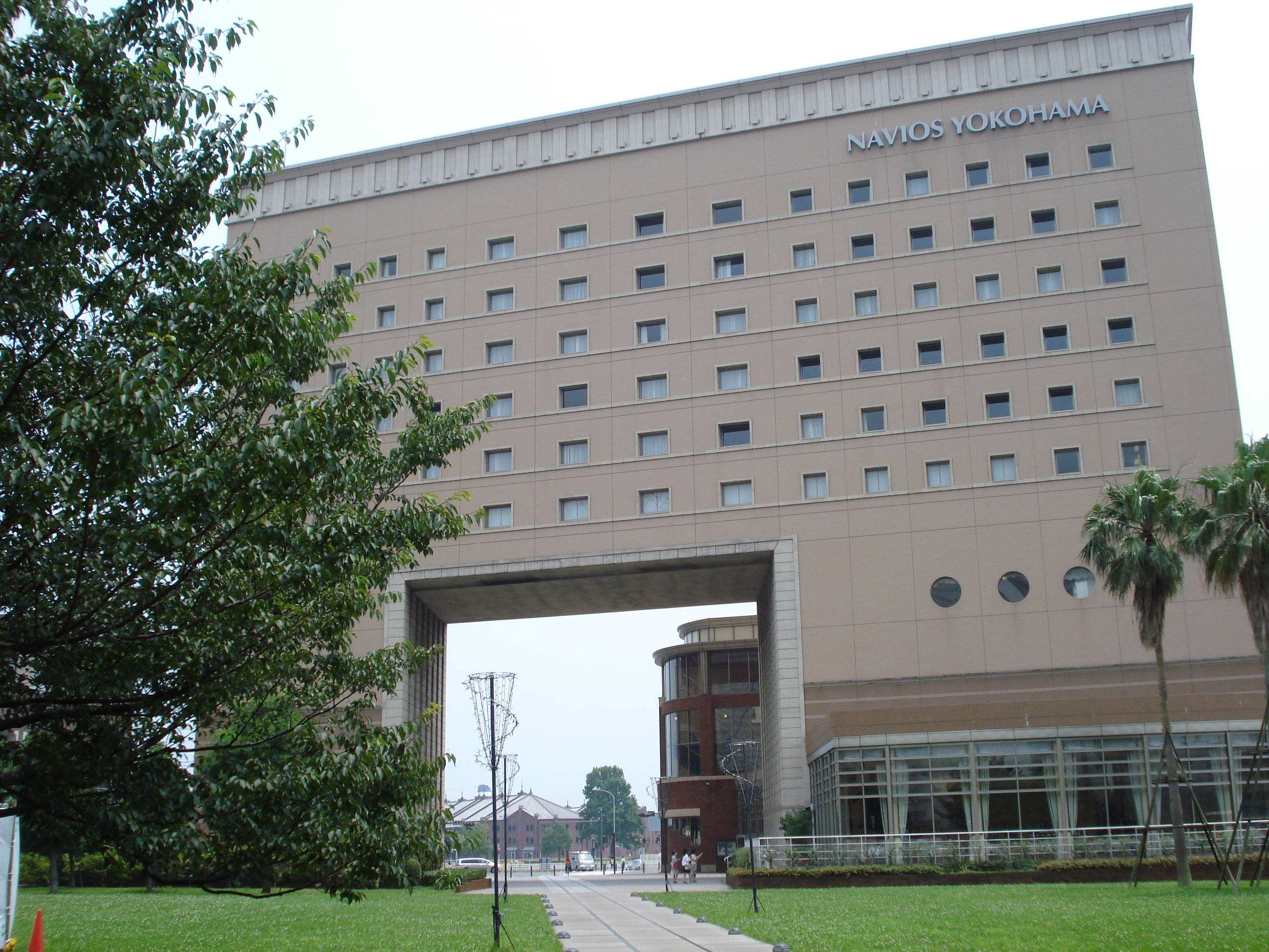 navios yokohama